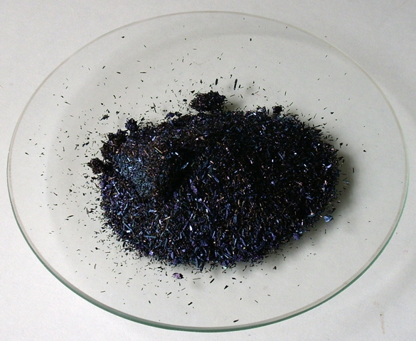 KMnO4